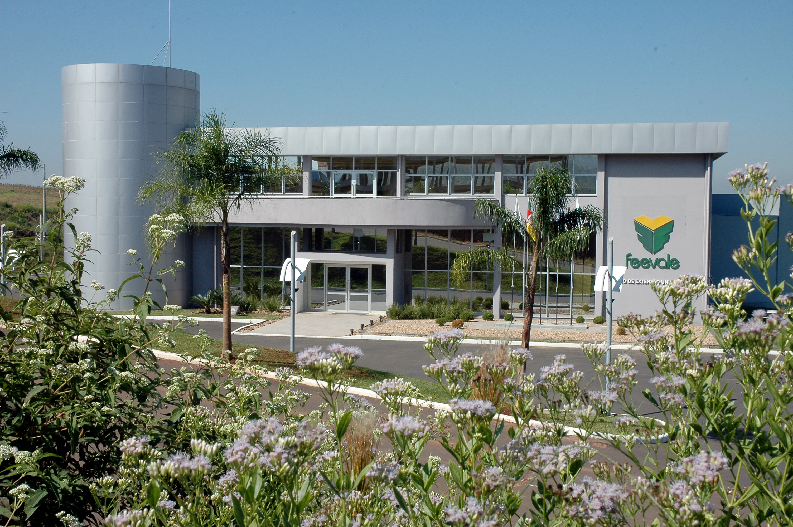 Prédio da Feevale no Parque Tecnológico do Vale do Sinos